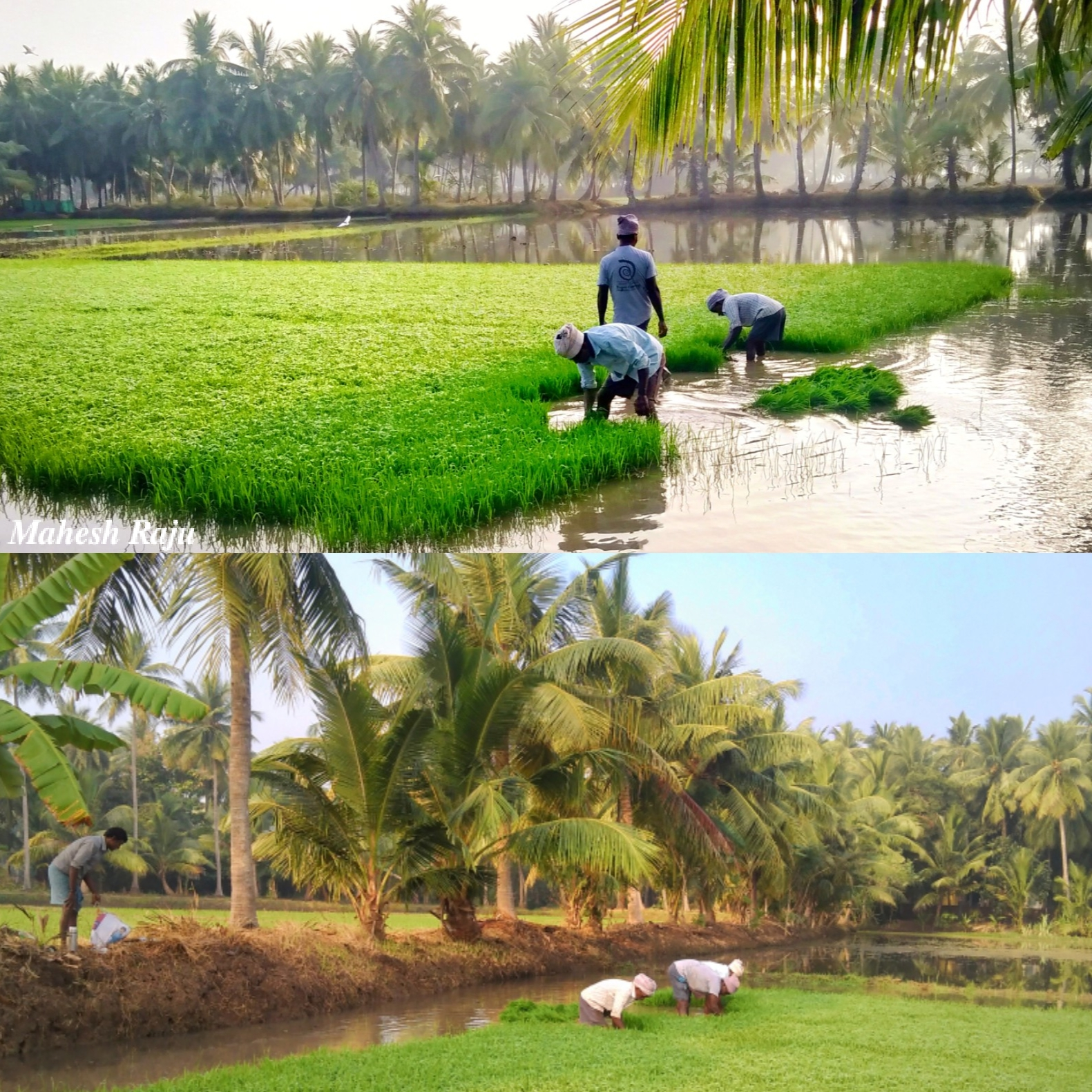 పొలంలో పనులు చేస్తున్న చిత్రం